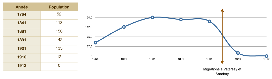 Évolution de la population de l'île écossaise de Mingulay.